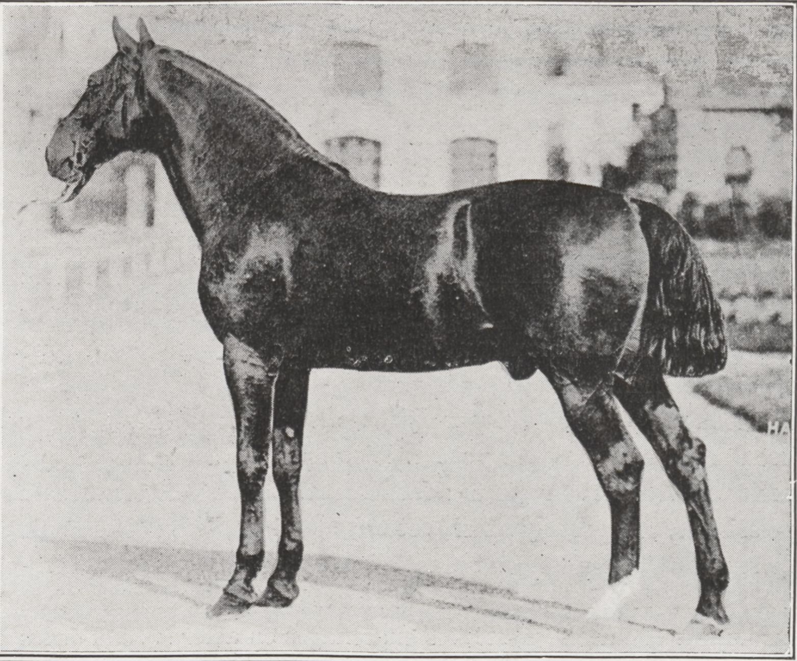 L'étalon trotteur Harley (né en 1885) dans la revue Le Sport universel illustré